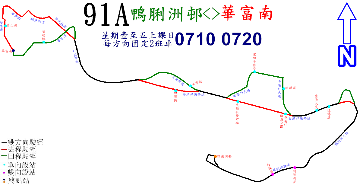 中文（香港）: 新巴91A線的走線圖